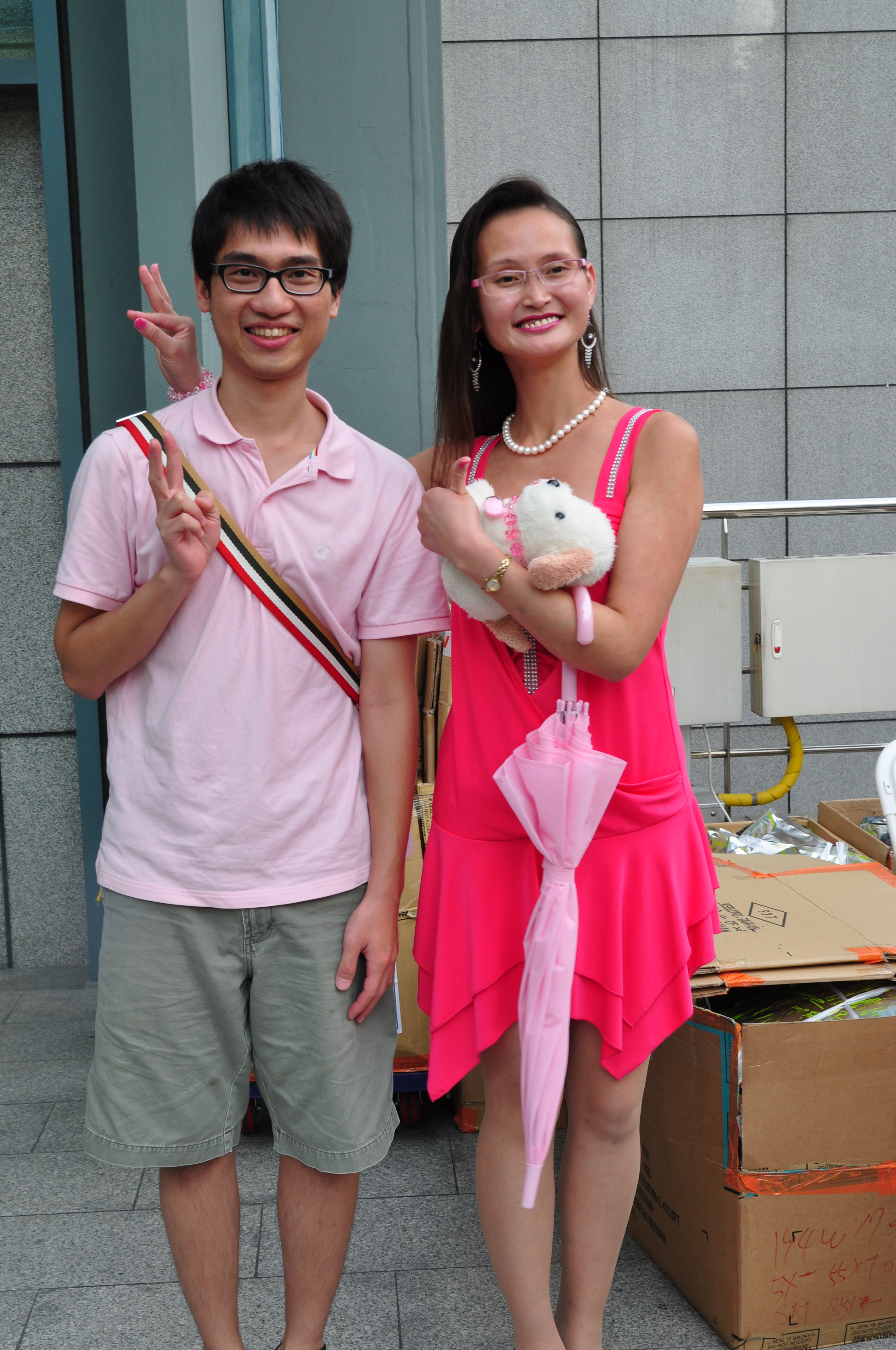 慧慈在台北小巨蛋的照片，抱著她最愛的玩偶狗「Baby」。